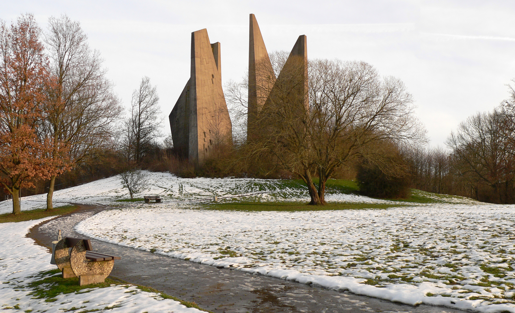 Friedland-Mahnmal